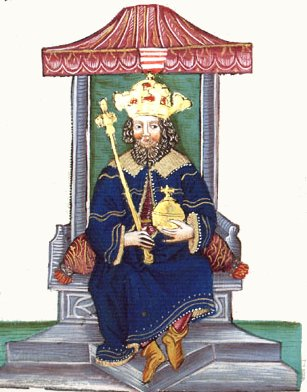 Wenzel III King of Poland author-Maciej Szczepańczyk-user Mathiasrex